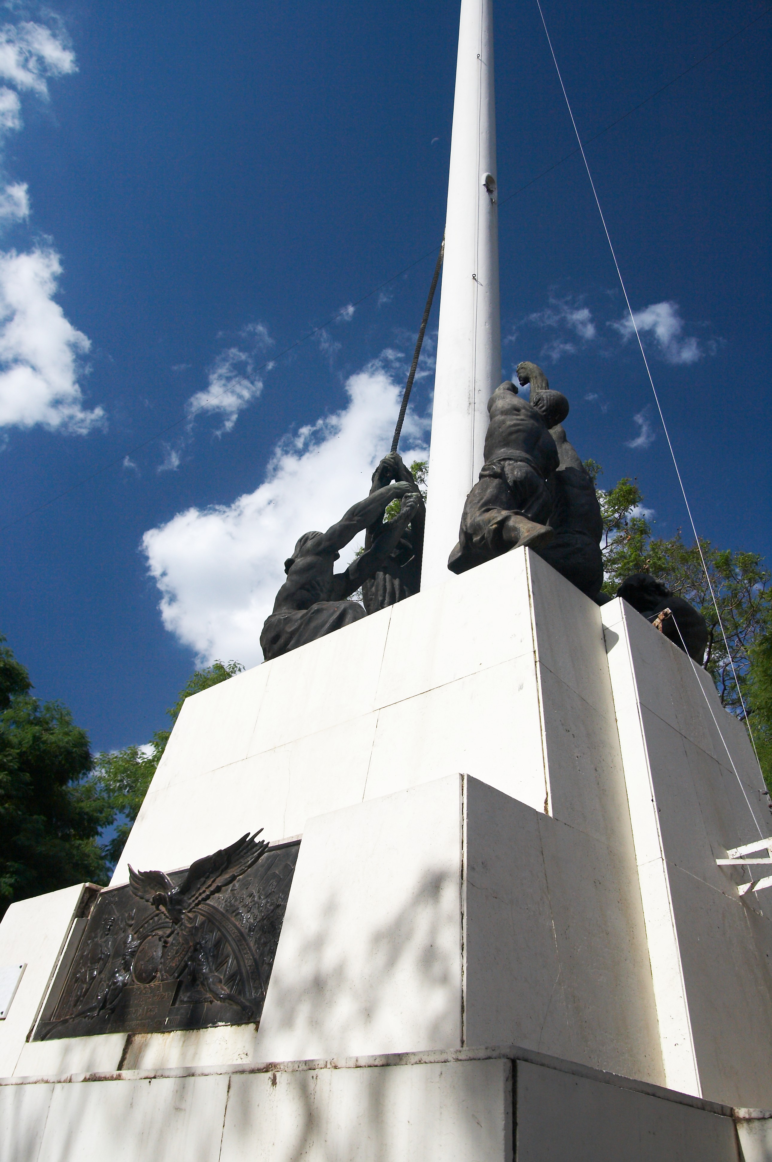 Mástil en Plaza Colombia, barrio de Barracas, Buenos Aires, Argentina.